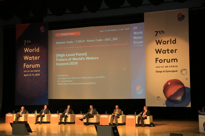 2015 세계 물 포럼